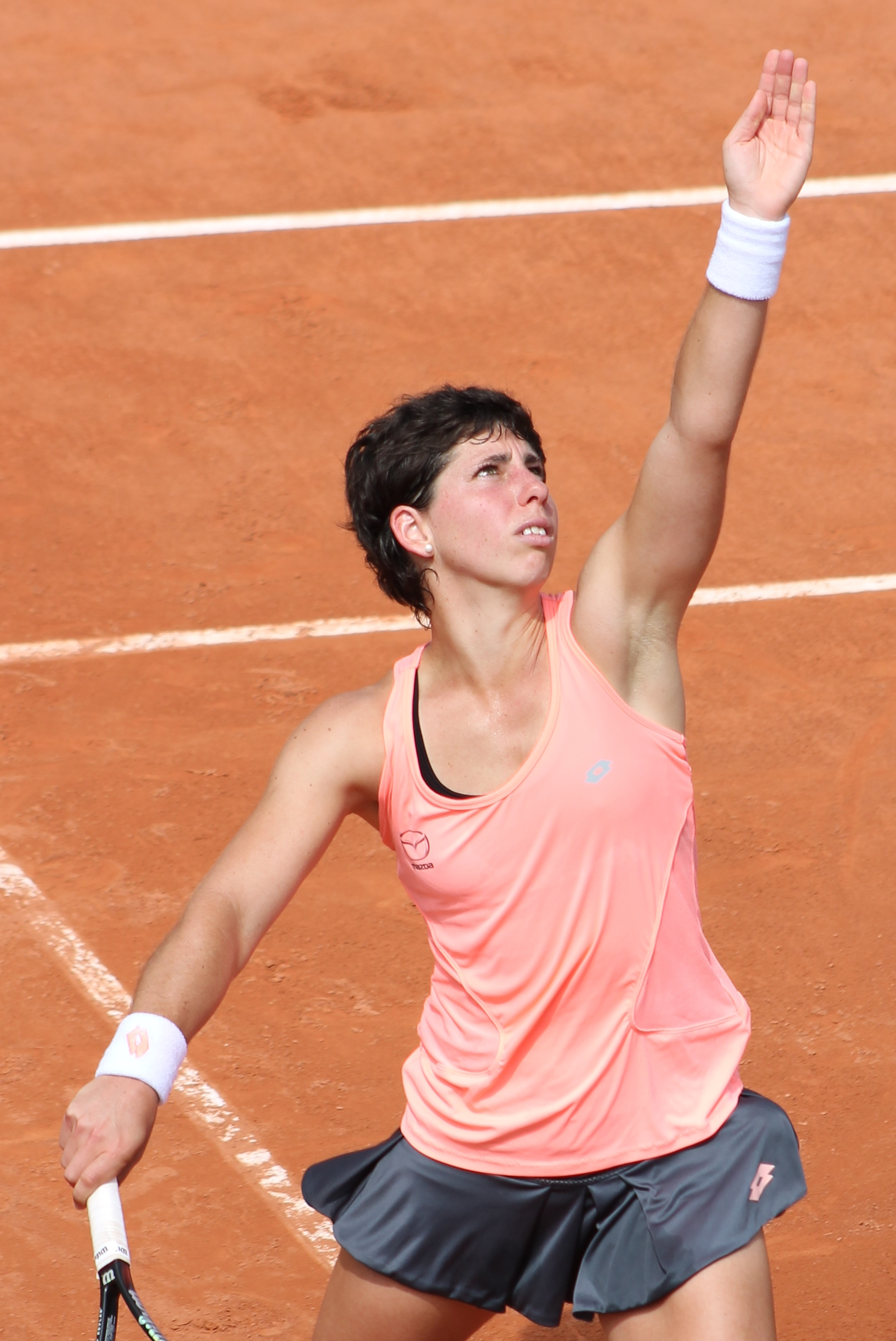 Suarez Navarro RG16 (7)